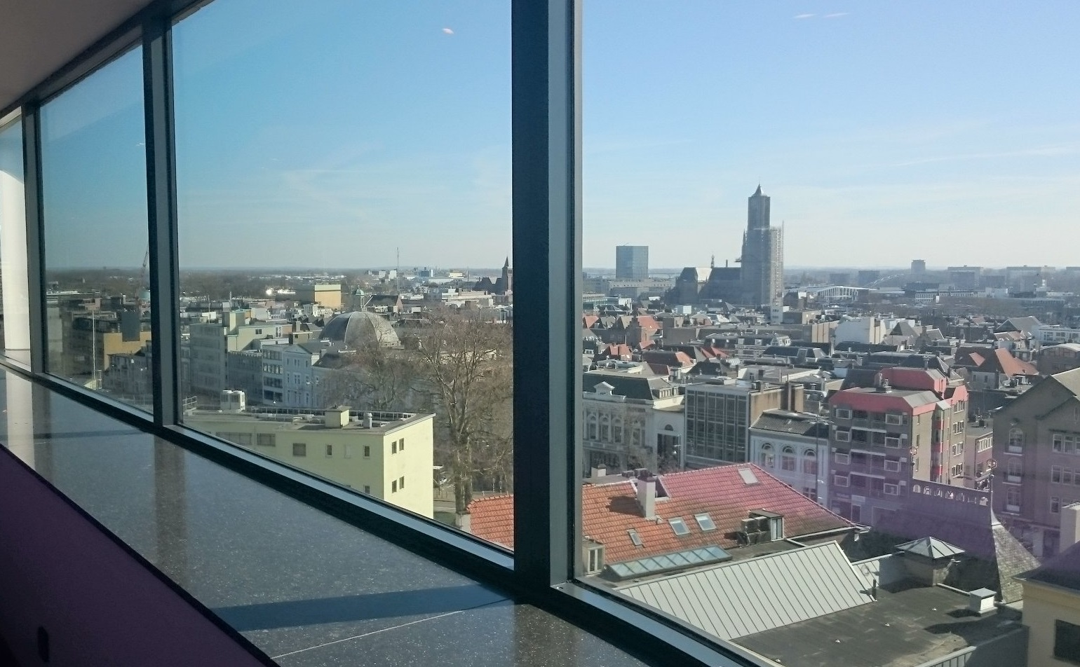 View from the cinema of Pathé, Arnhem, Province of Gelderland, Netherlands